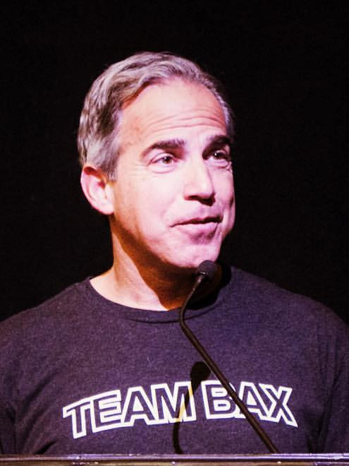 Cliff Josephy nach dem Main Event der World Series of Poker 2016